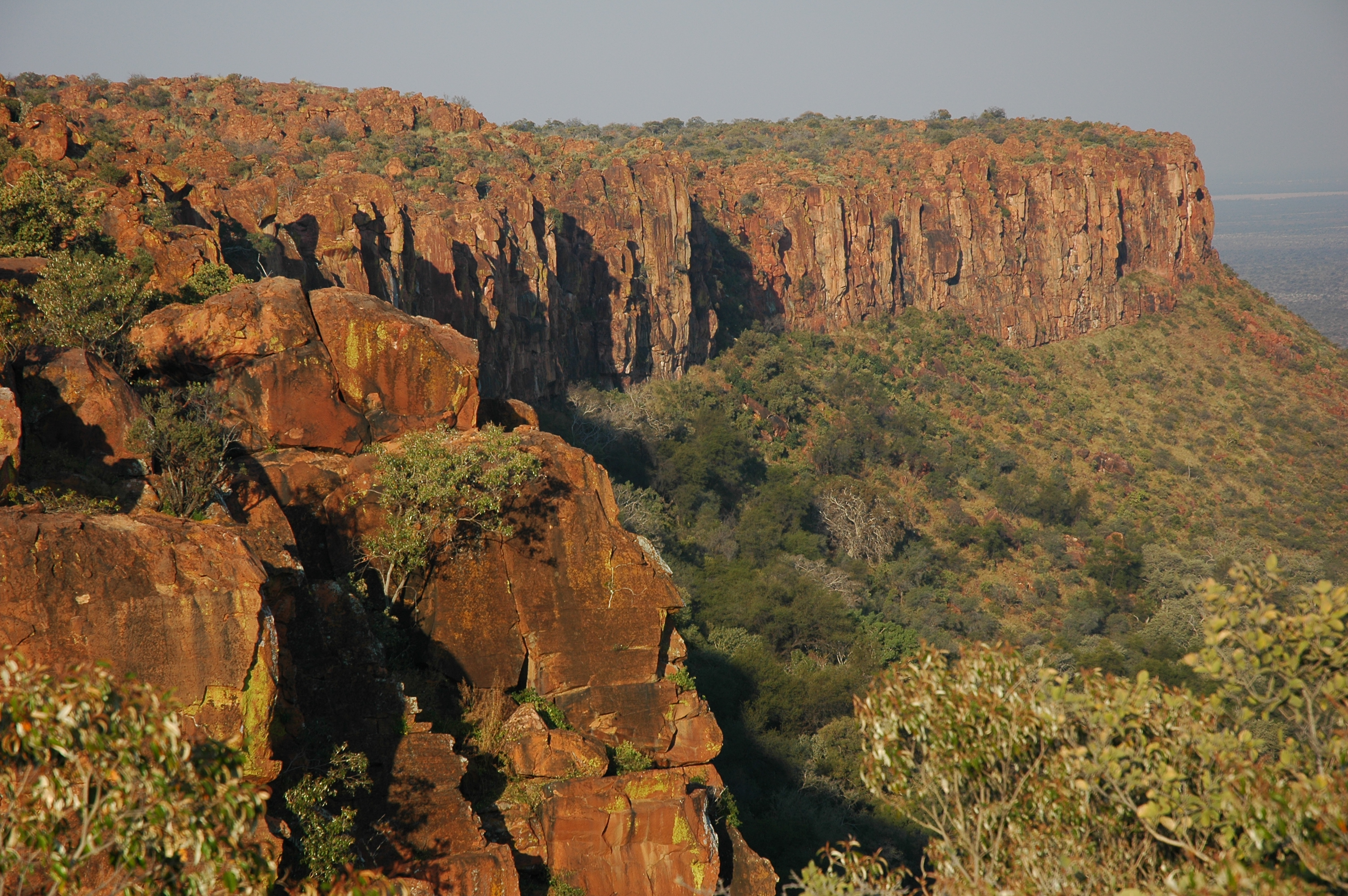 Uitsig vanaf die sandsteenplato in die Waterbergplato Nasionale Park in Namibië